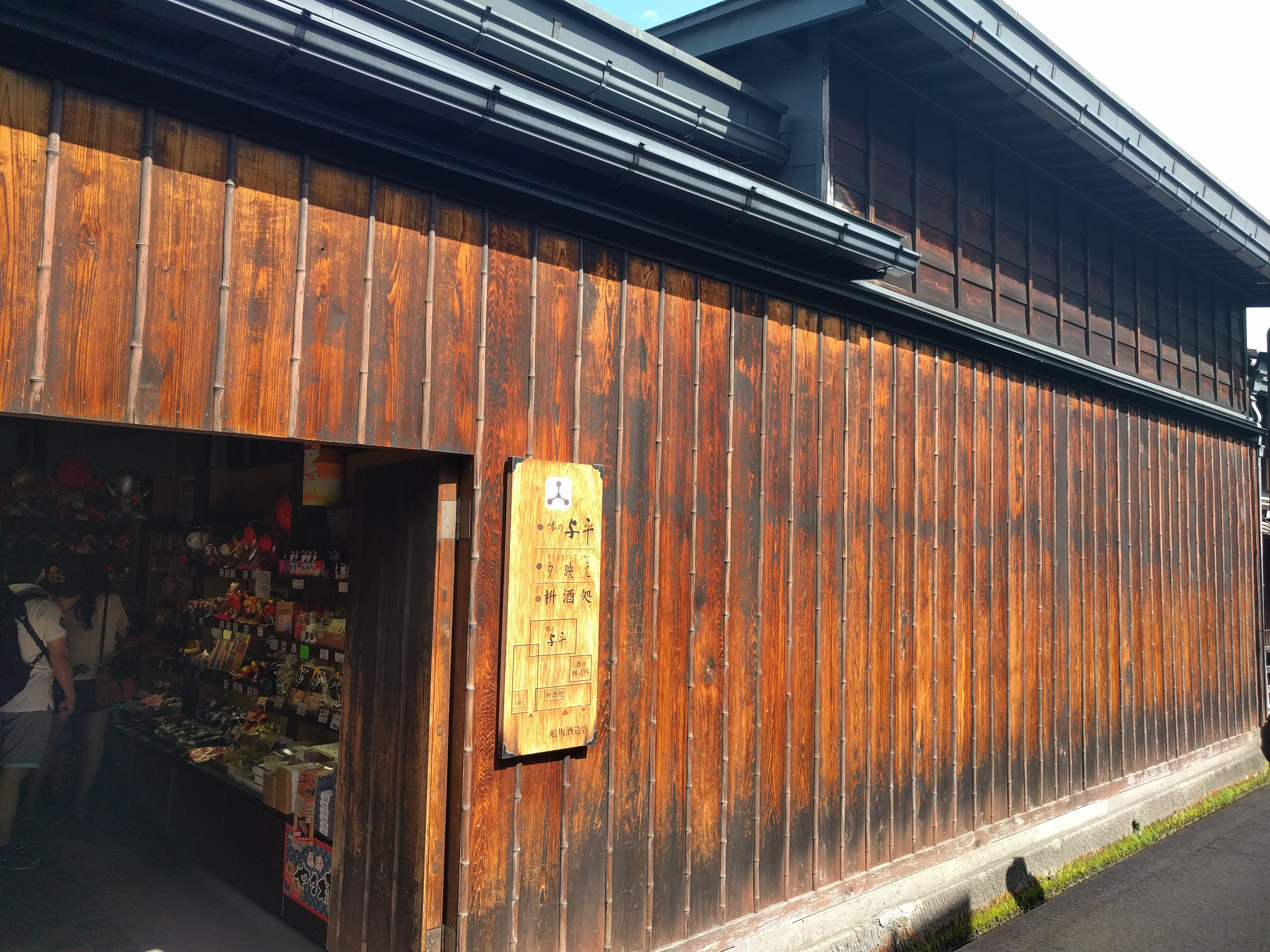 Takayama Old Town (Sanmachi Suji)